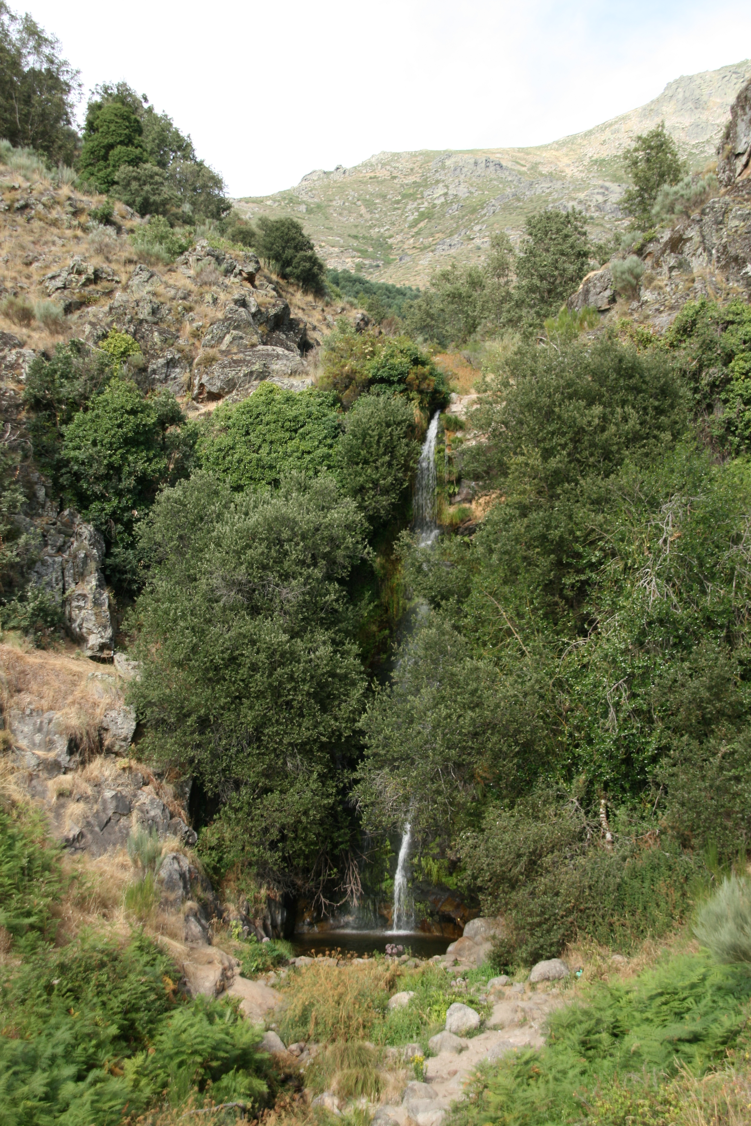 La Chorrera, en el nacimiento del río Ambroz